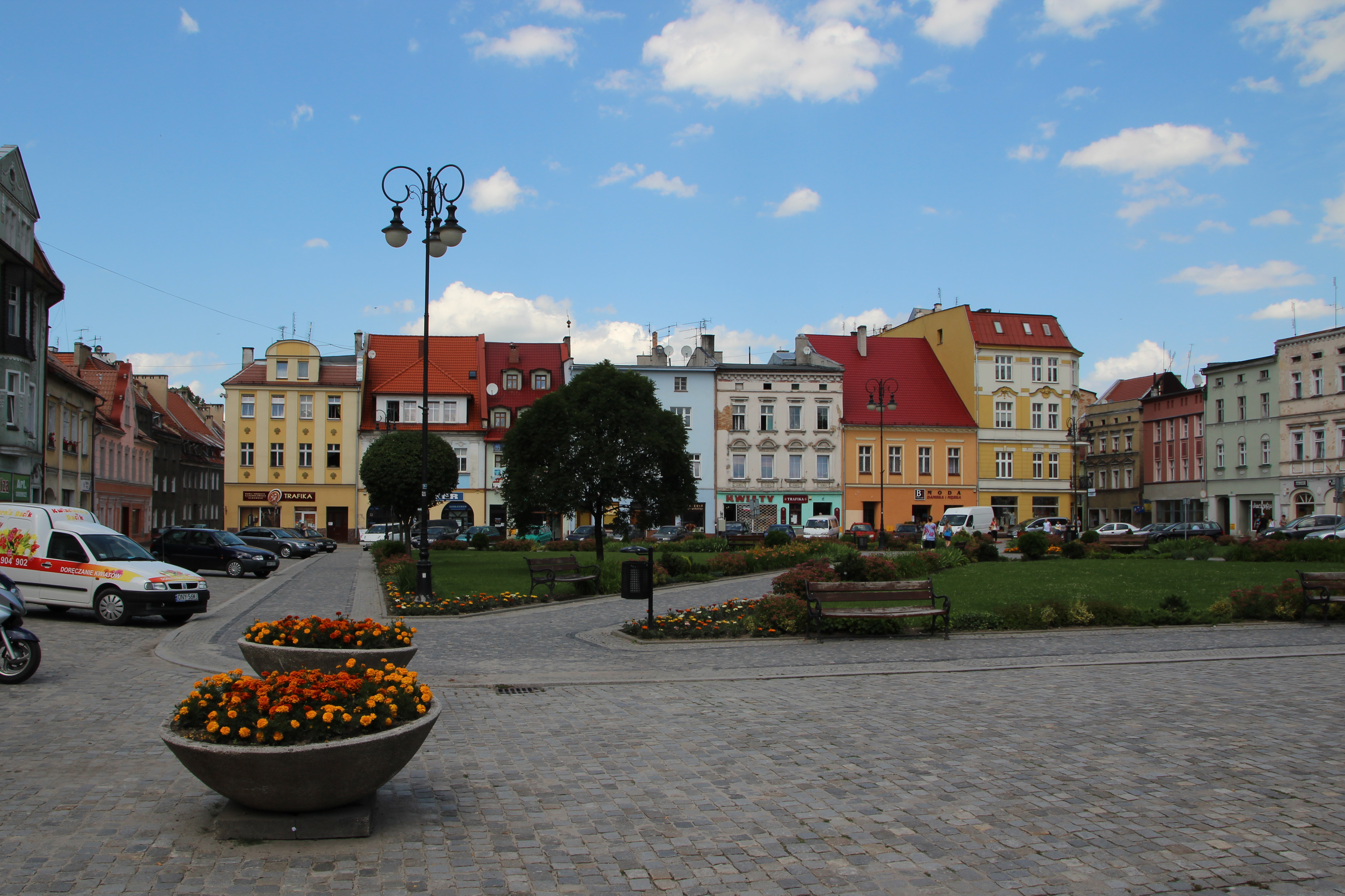 Głuchołazy - miasto w Polsce w województwie opolskim, w powiecie nyskim.